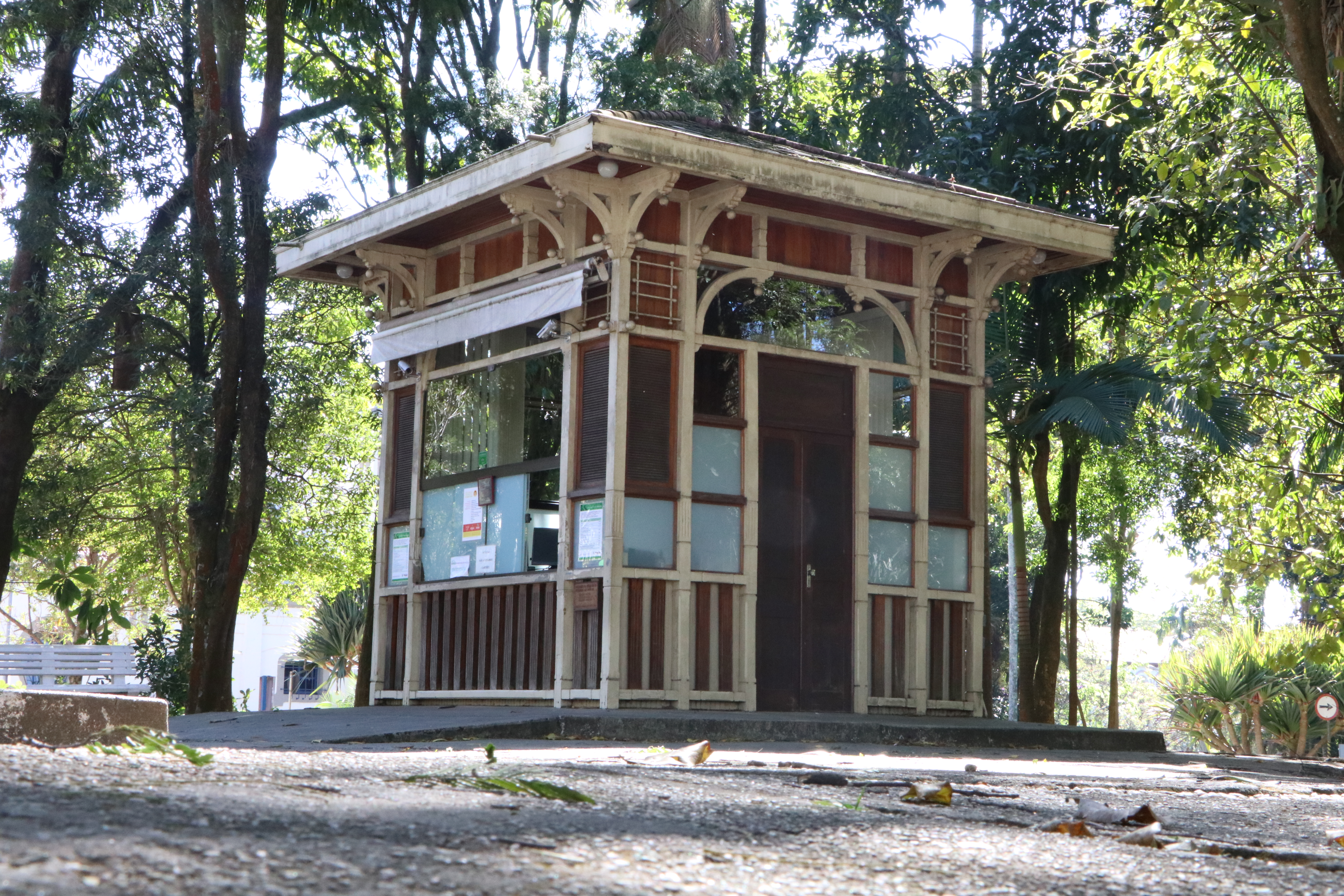 Instituto Butantã